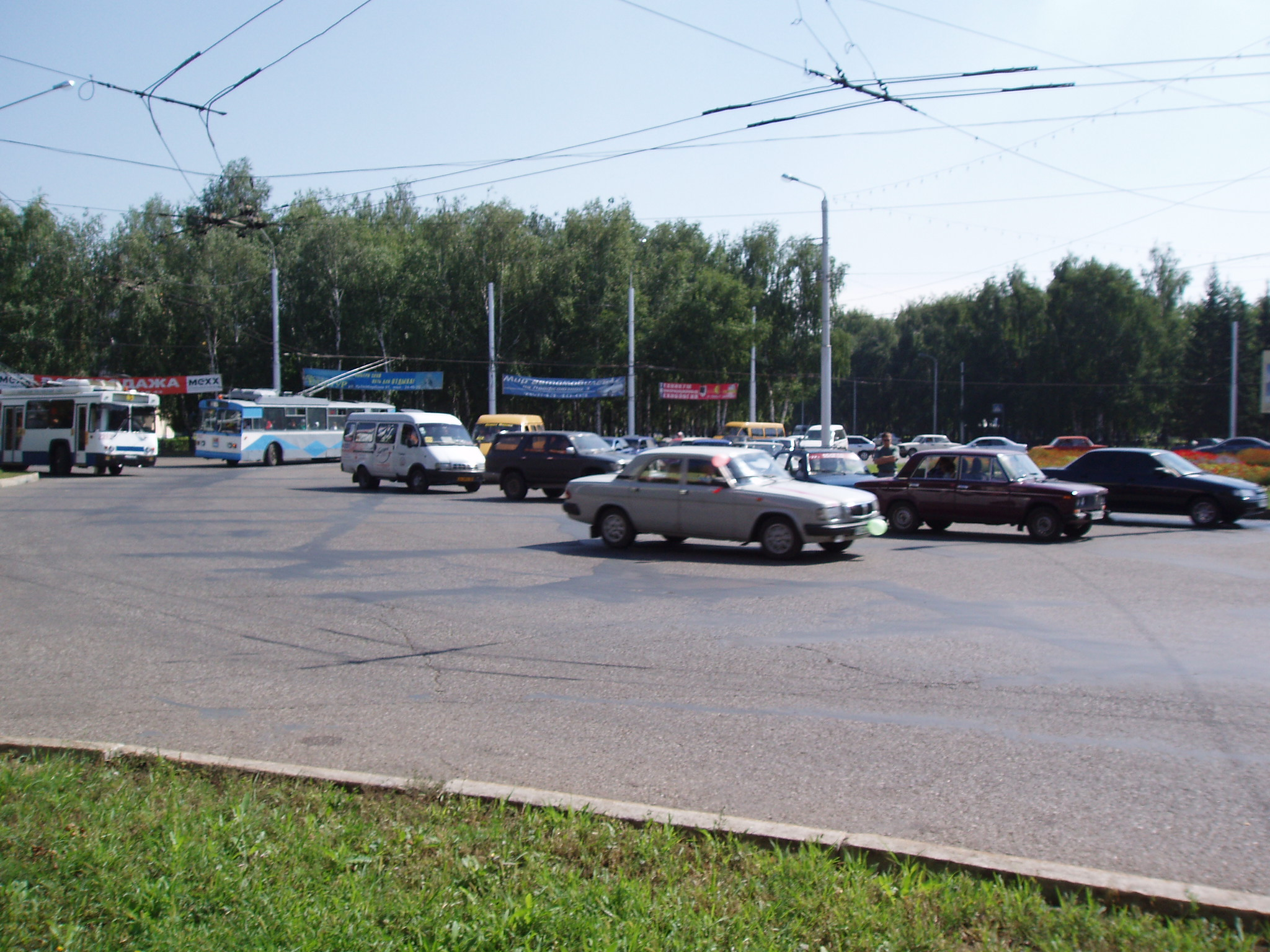 Центральное Дорожное Кольцо ("Вечный Огонь"), г.Стерлитамак